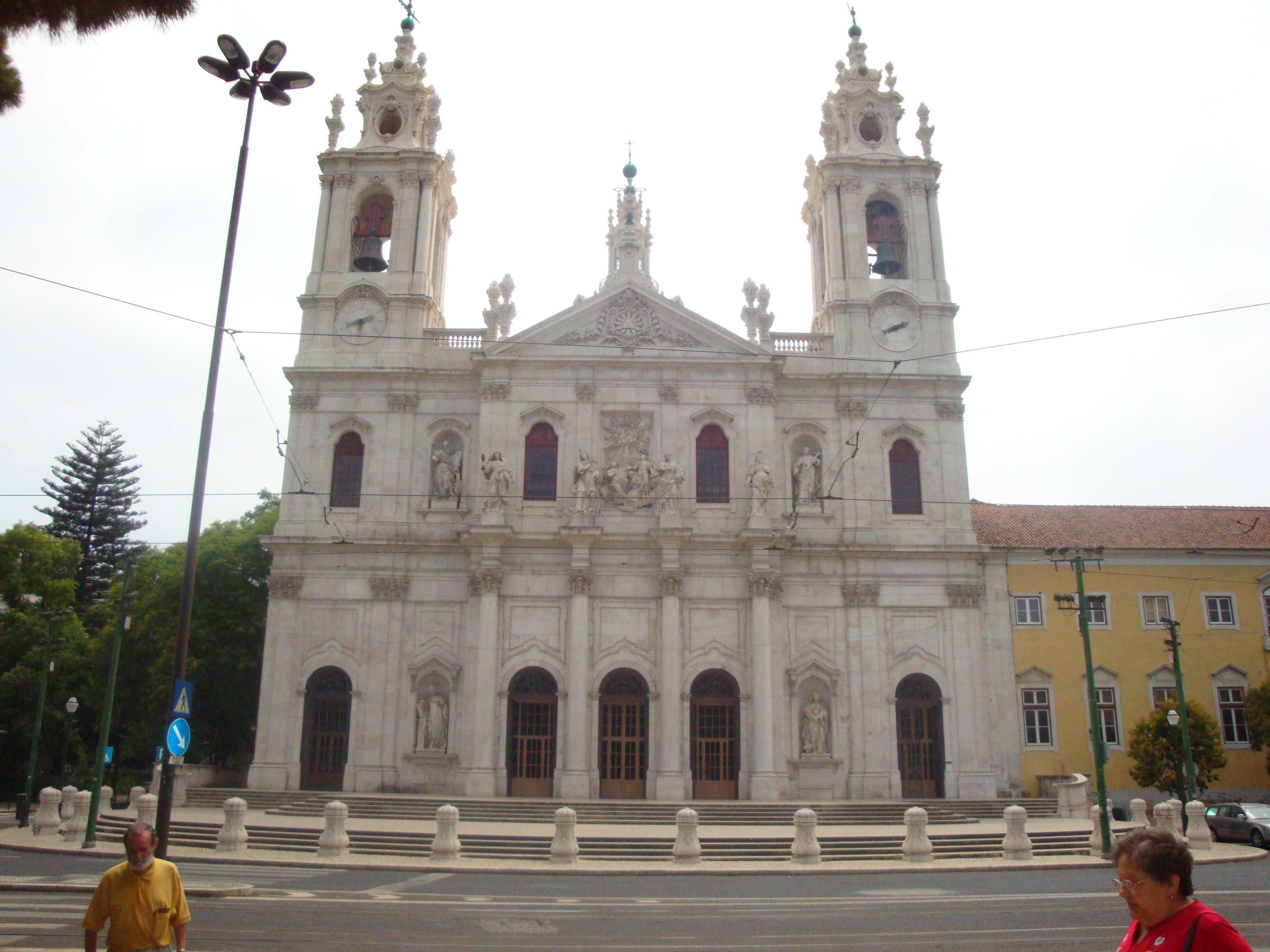 Basílica da Estrela, Lisboa